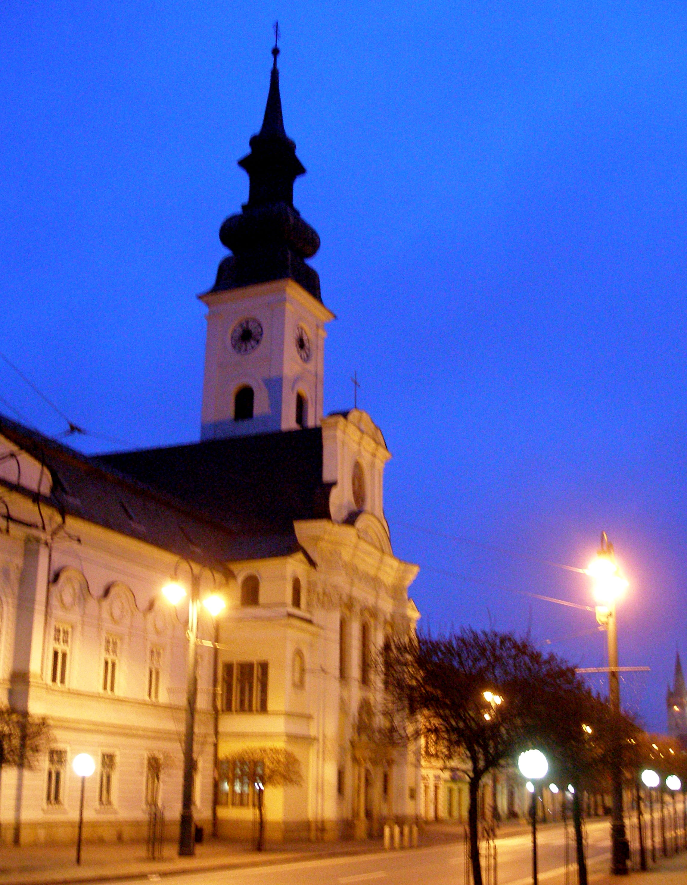 Hlavná ulica v Prešove. Katedrálny chrám sv. Jána Krstiteľa.